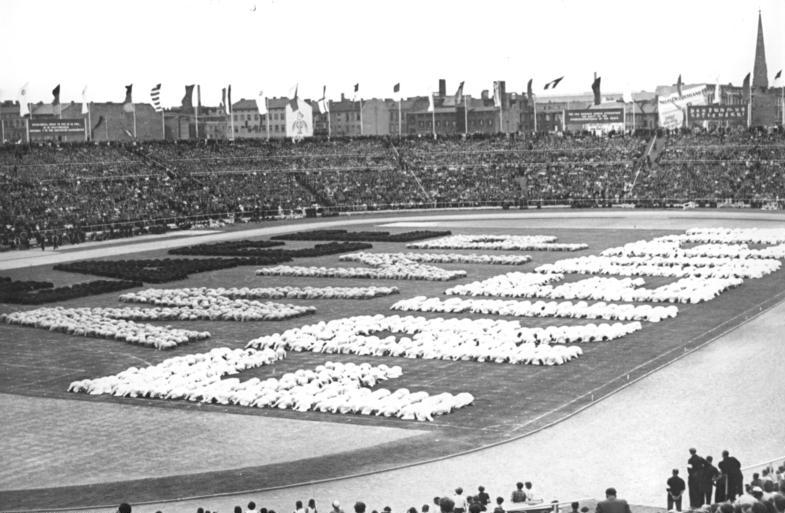 Berlin, III. Weltfestspiele, Eröffnungsfeier ADN-ZB Sturm -5.8.1951 Berlin: Die grosse Sportschau der Jugend nach der Eröffnung der Weltfestspielen am 5.8.1951 Die Losung "Frieden" wird in deutscher, russischer und englischer Sprache von den Sportlern zum Abschluss der Veranstaltung dargestellt.